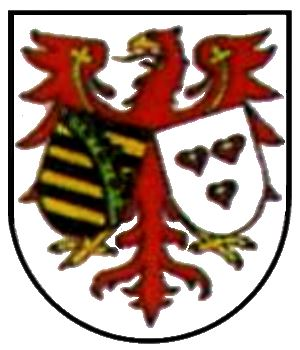 Landkreis Herzberg/Elster 1991-1993